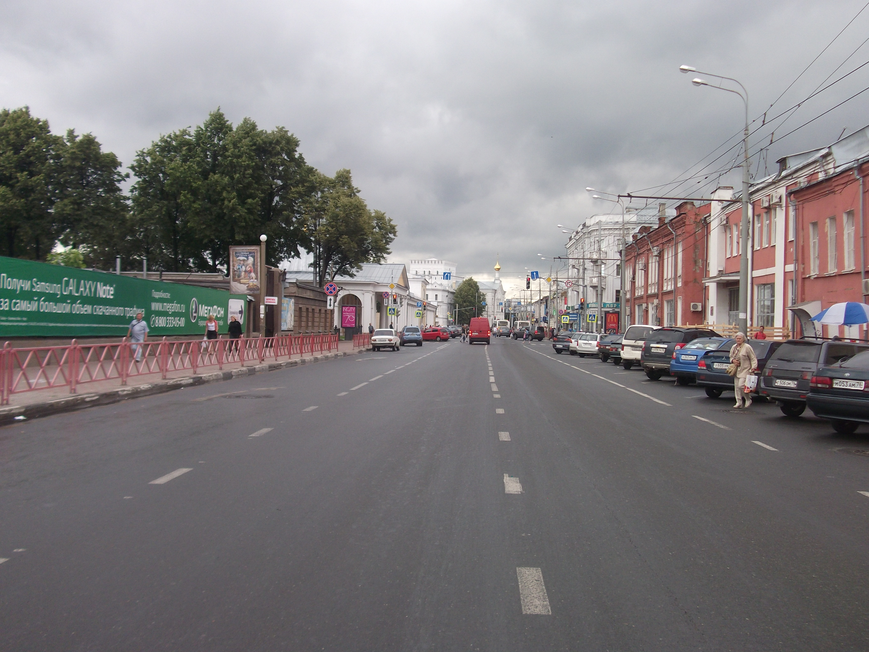 улица Первомайская (Ярославль)